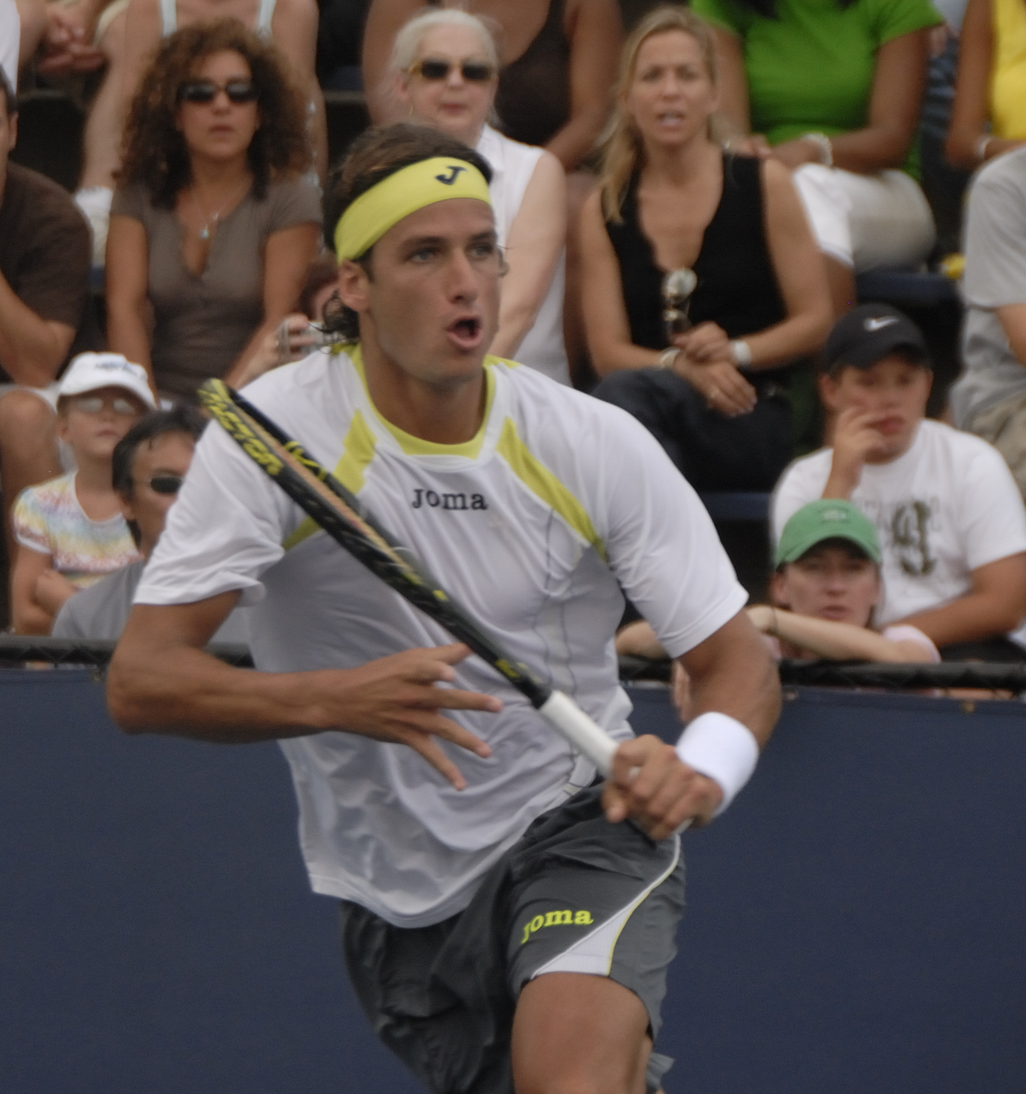 Feliciano López at 2008 US Open